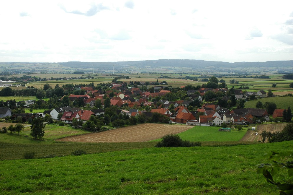 Bensen (Hess. Oldendorf), Niedersachsen, Germany (Blick vom Osterberg-Süntel)